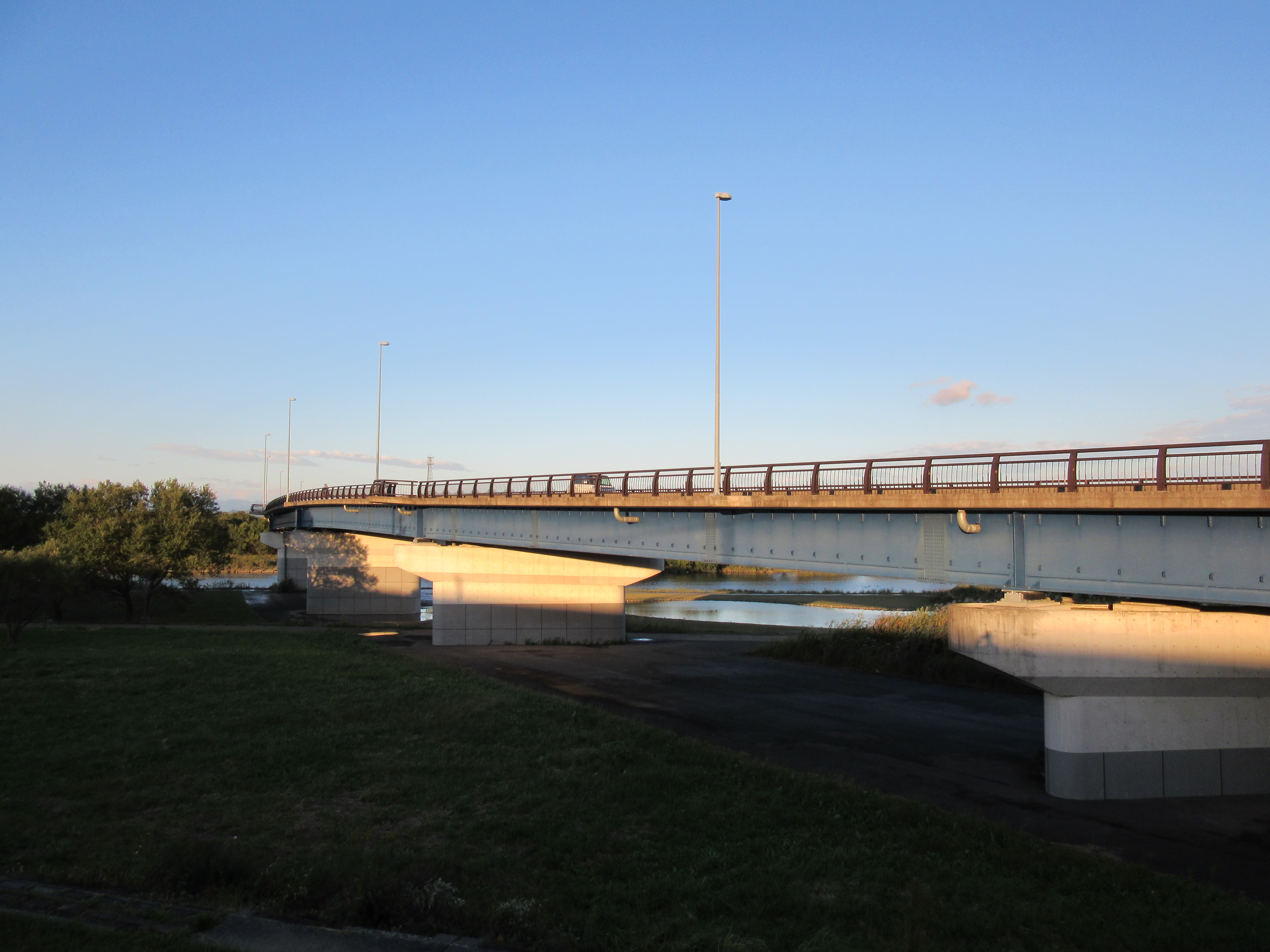 犀川大橋（瑞穂市）